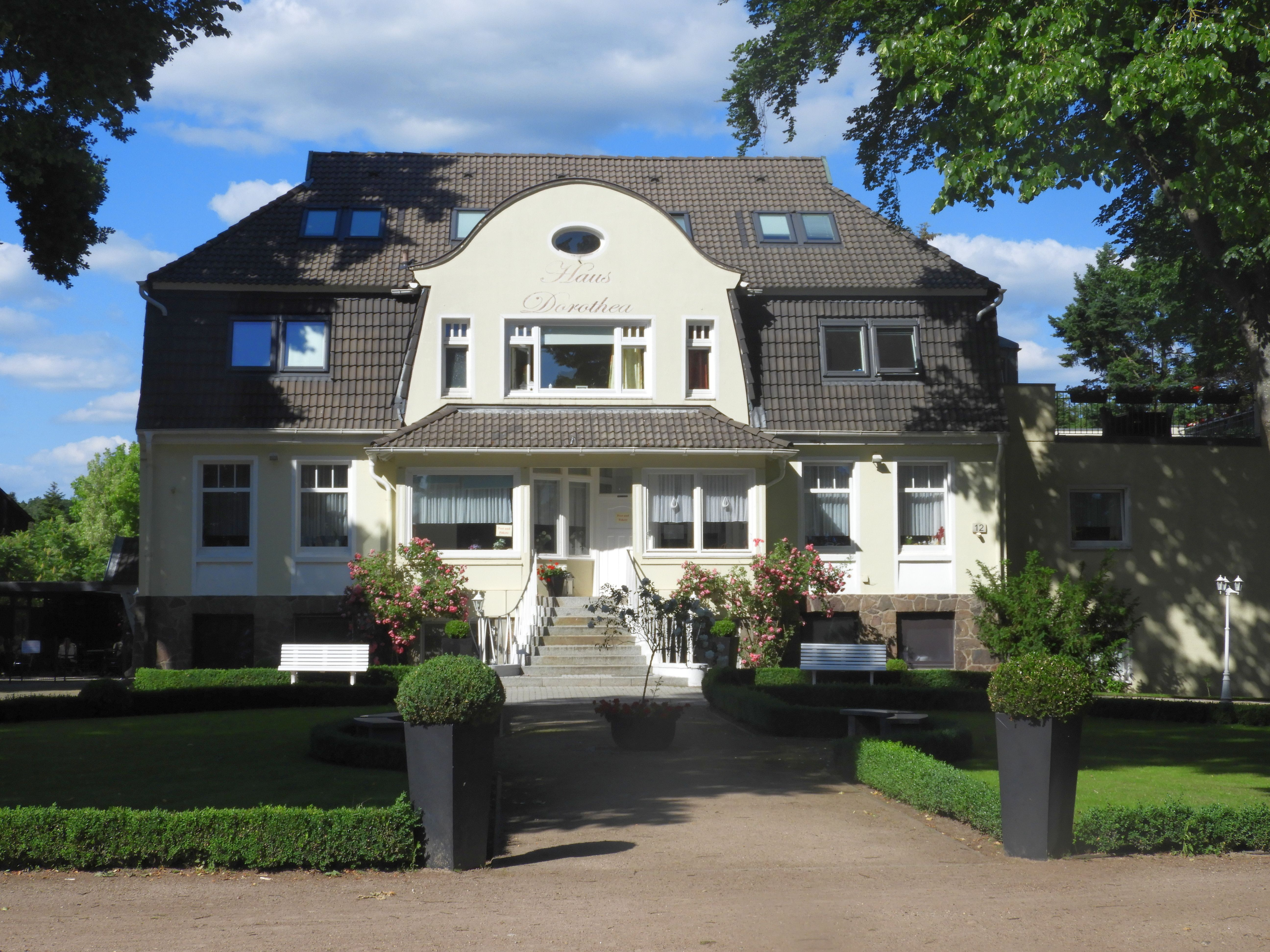 Seit dem 16. Jahrhundert stellte die Familie Berling/Jenkel die Bauernvögte in Witzeeze. Das Herrenhaus wurde 1912 durch einen Neubau ersetzt. 1986 wurde es verkauft und seither als Altenwohnheim "Haus Dorothea" genutzt.